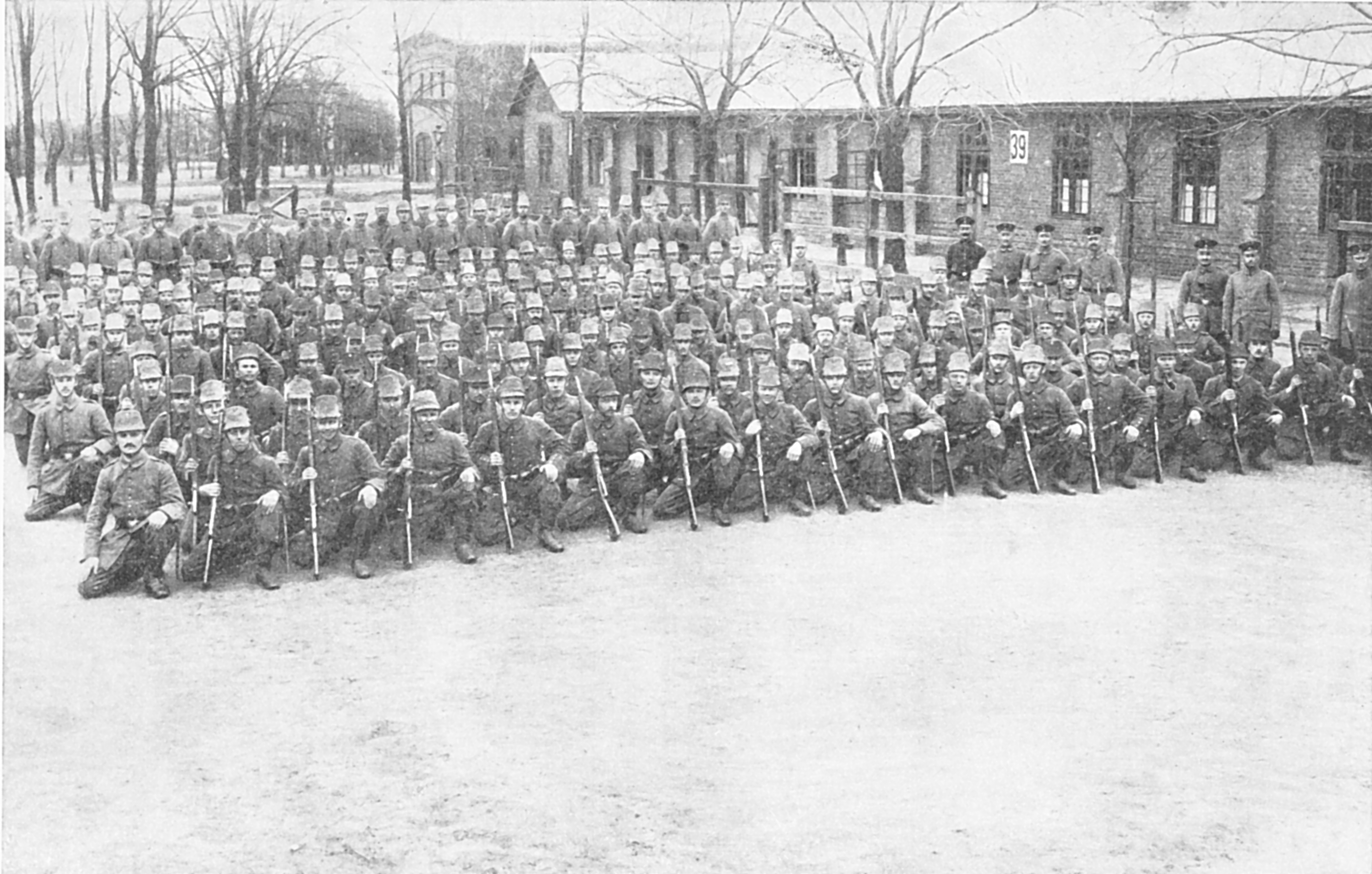 Jääkäripataljoona 27:n 1. komppania, kuva otettu 5. huhtikuuta 1916.